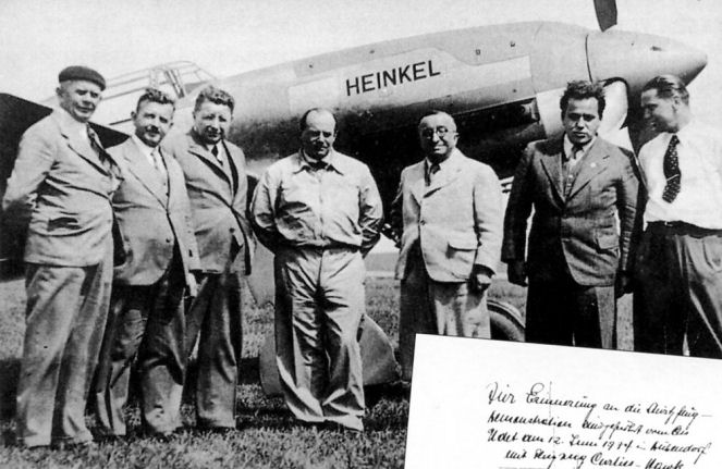 Удет и Хейнкель на фоне He 100